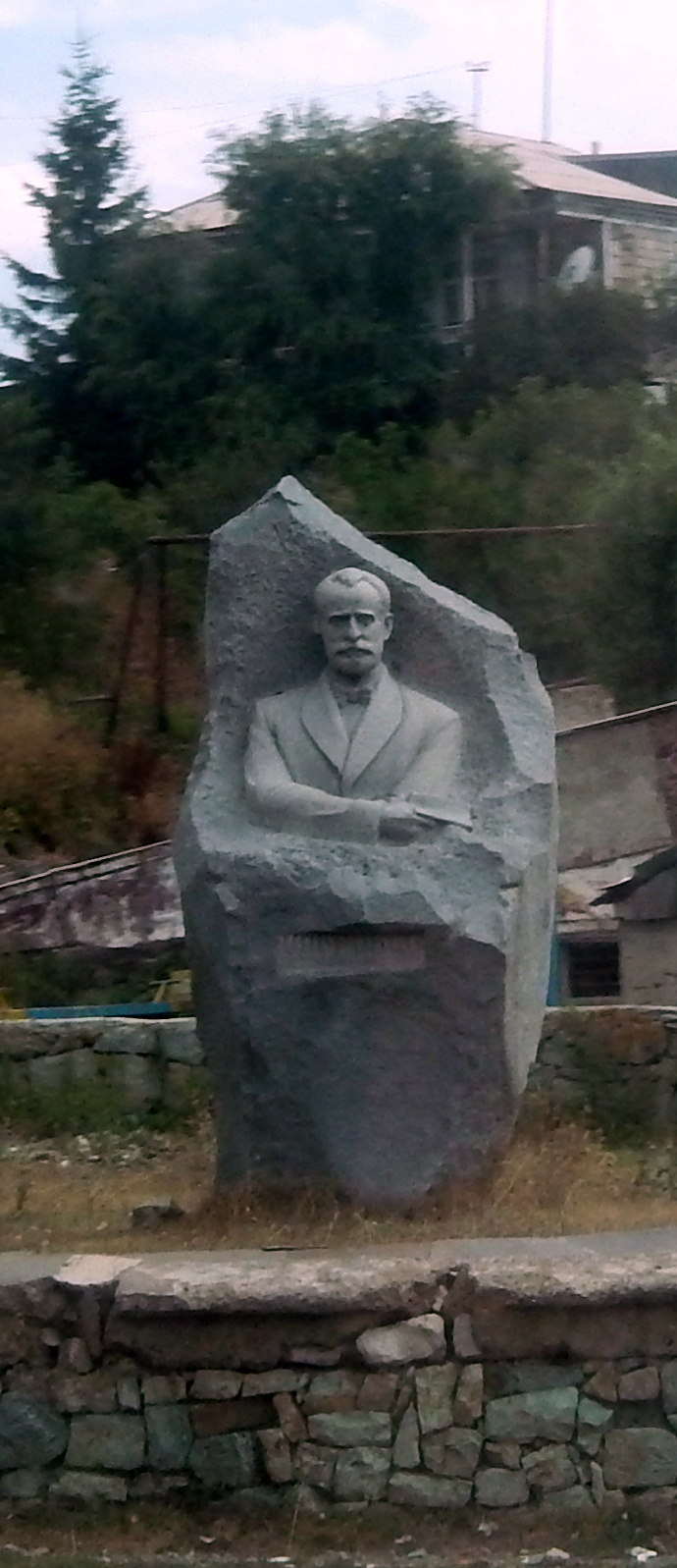 Մուրացանի հուշարձանը Ծովագյուղի գյուղամիջյան ճանապարհին 49/9